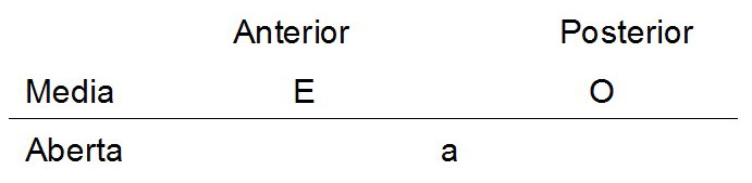 self made